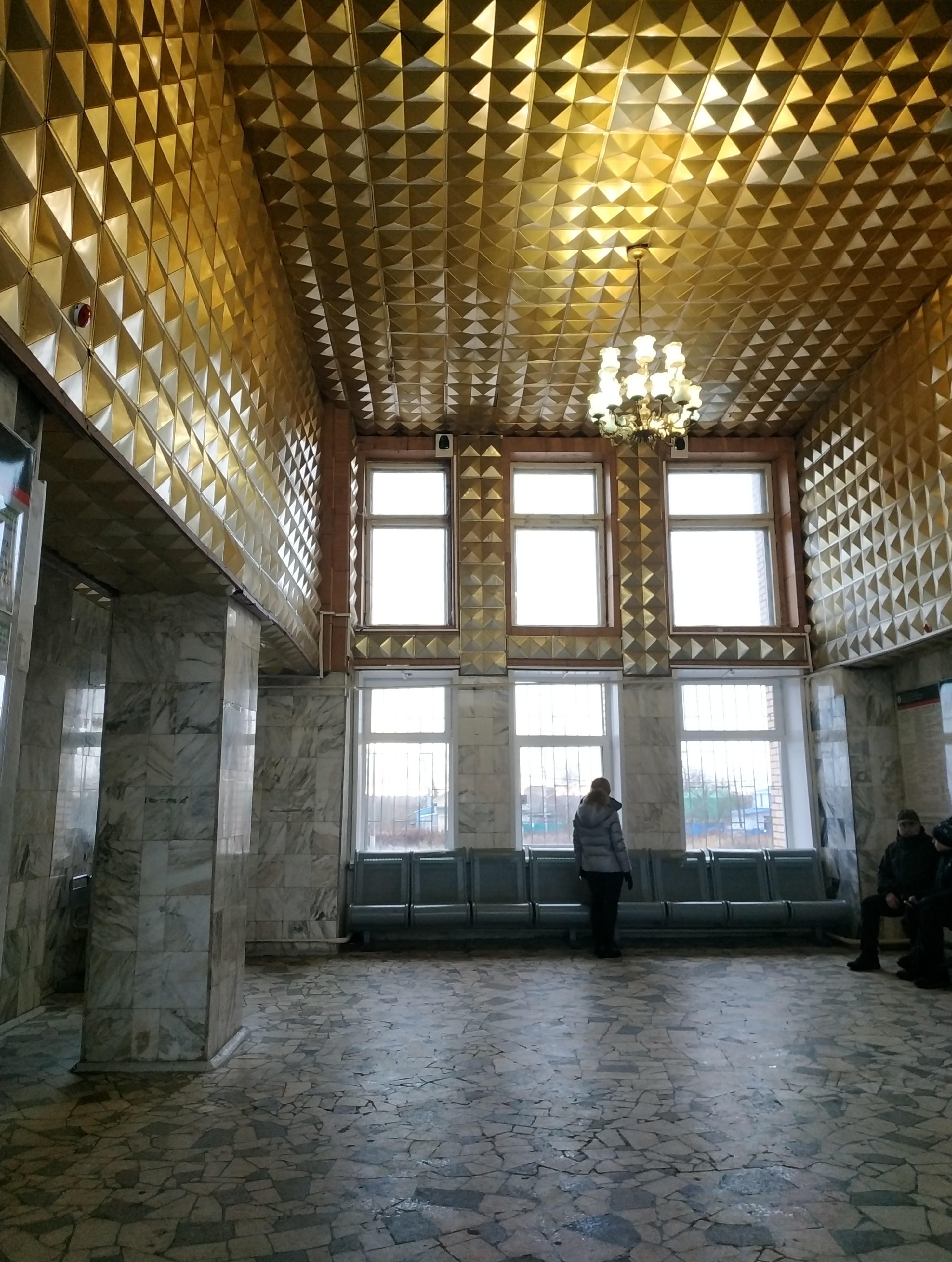 Станция Талдом